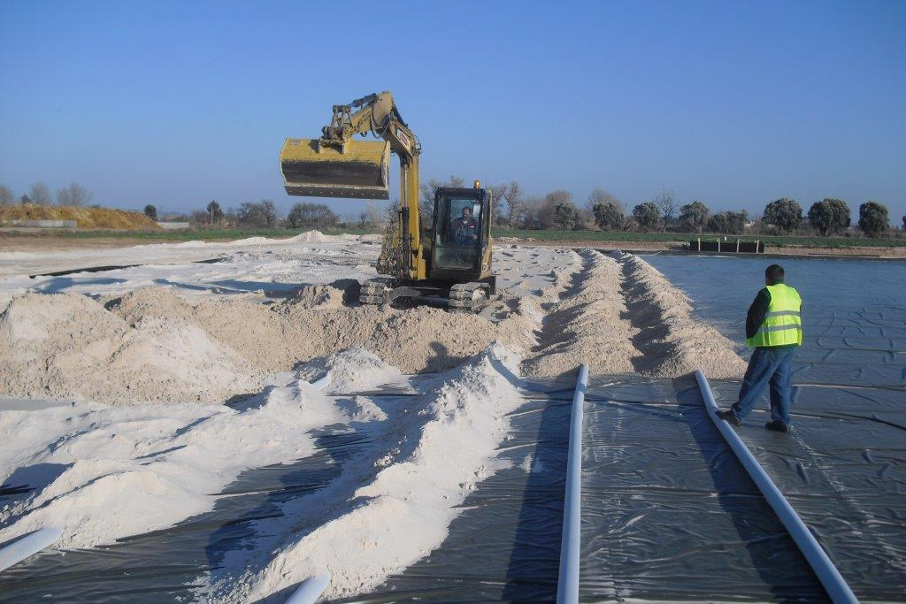 Reitplatz Ebbe-Flut, riding arena tide